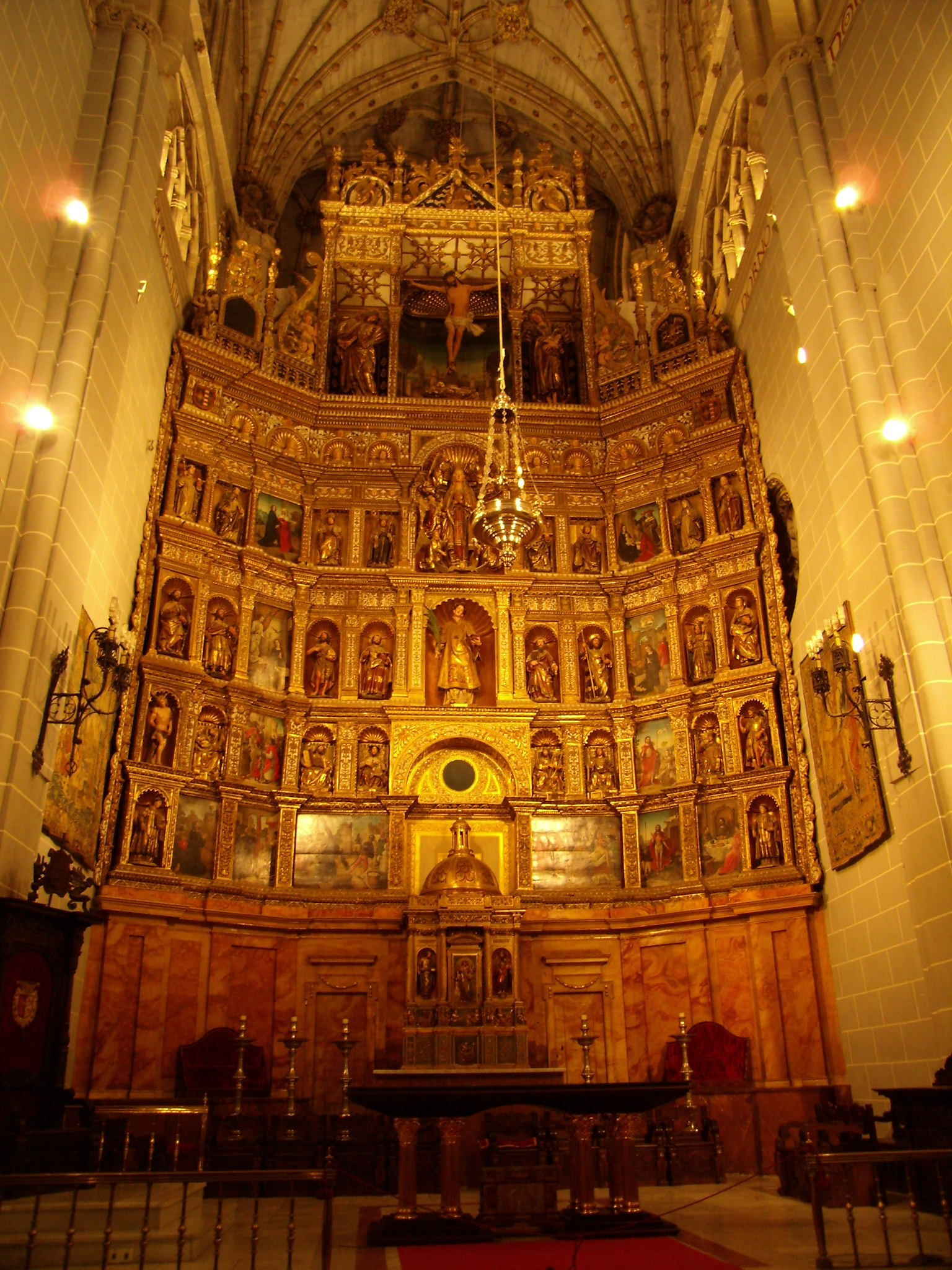 Retablo Mayor de la Catedral de Palencia (Castilla y León, España)